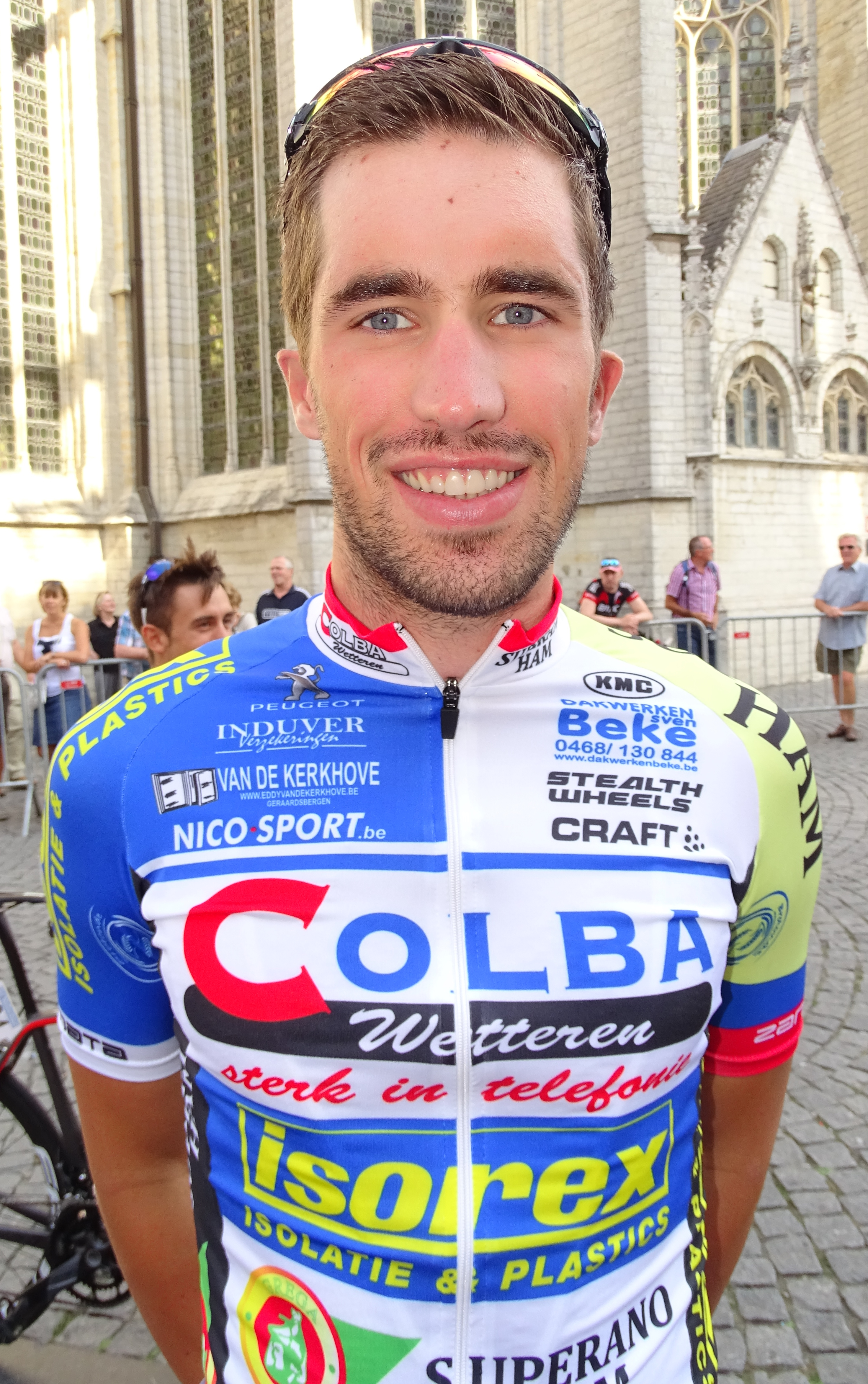 Reportage réalisé le dimanche 23 août à l'occasion du départ et de l'arrivée du Grand Prix Jef Scherens 2015 à Louvain, Belgique.